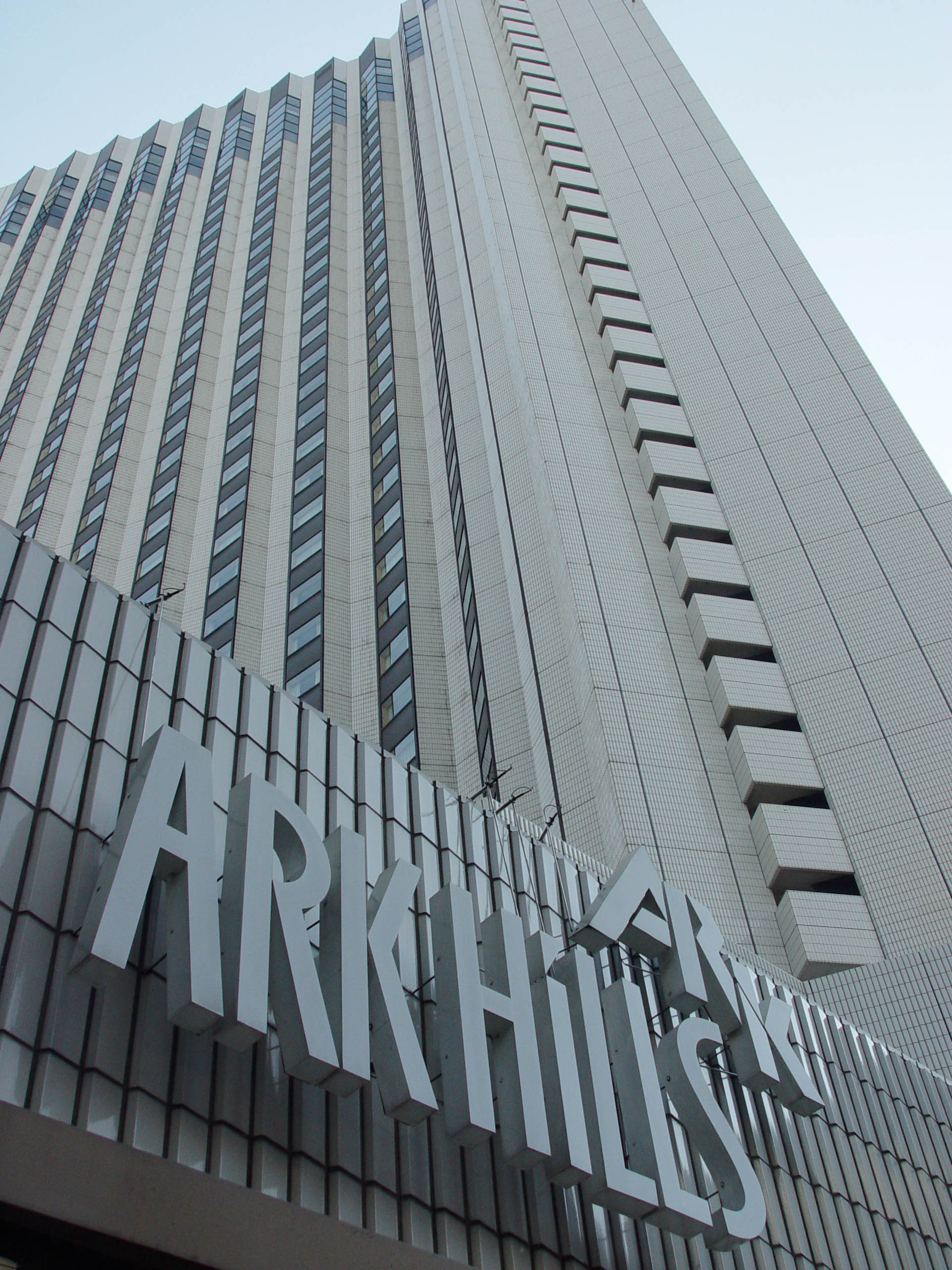 Ark hills, Minano, Japan アークヒルズ